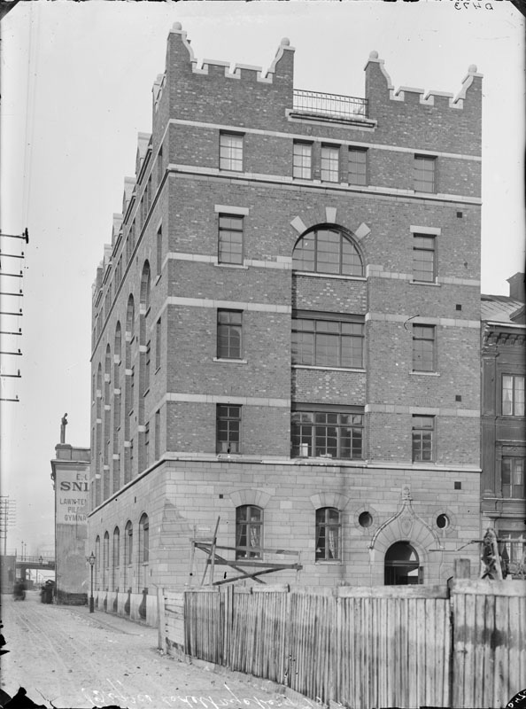 Jacob Bagges sedeltryckeri, Bryggargatan 18. Byggnadsår 1899. Arkitekt Ernst Stenhammar. Sett från Östra Järnvägsgatan som går norrut